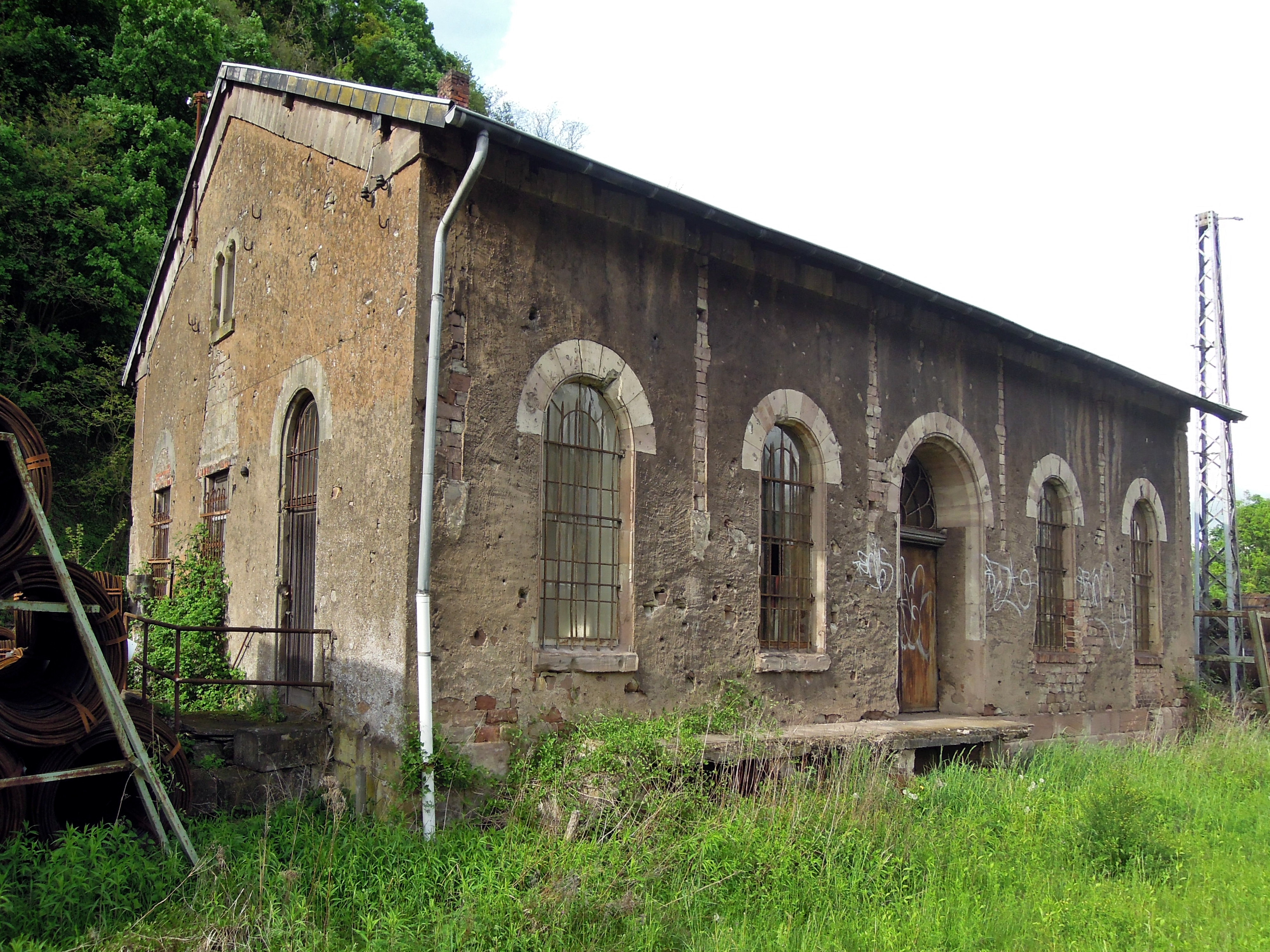 Halle gegenüber Bahnhof Beckingen